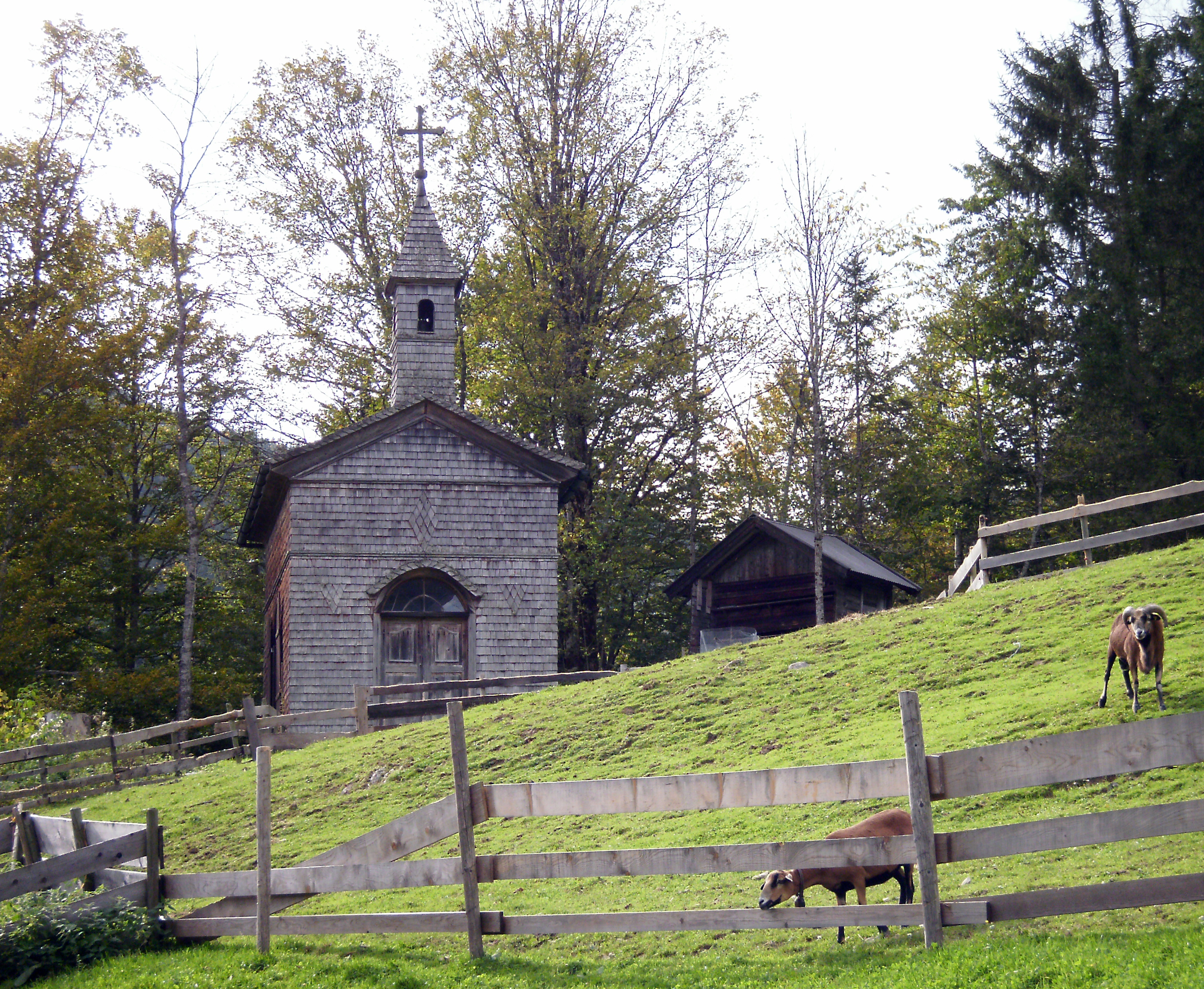 Kapelle Erzherzog-Johann-Klause, Blick vom Gasthof This media shows the remarkable cultural object in the Austrian state of Tyrol listed by the Tyrolean Art Cadastre with the ID 2258. (on tirisMaps, pdf, more images on Commons, Wikidata)